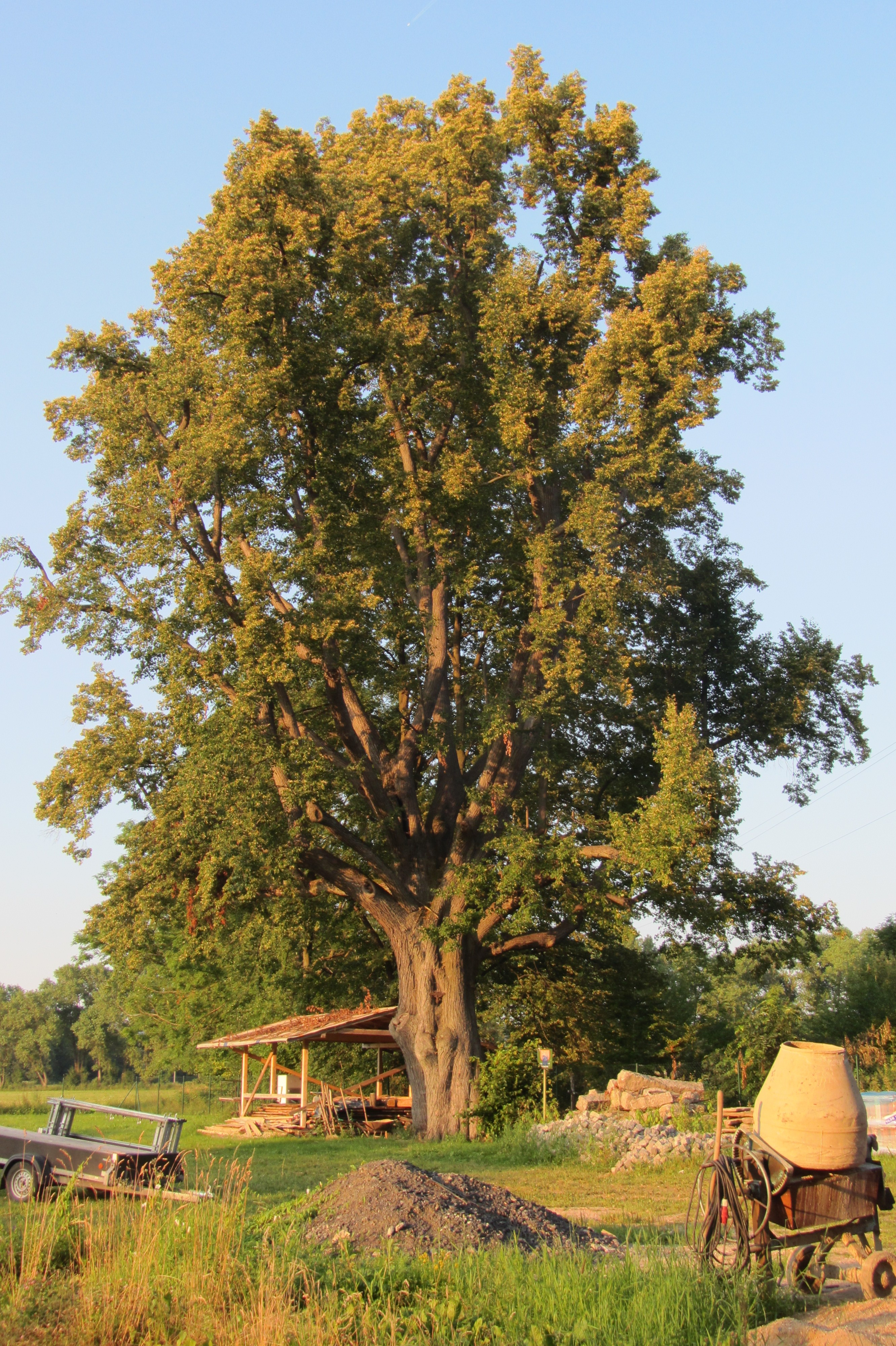 Horákova Lípa v Ludvíkově pod Smrkem (pohled od jihozápadu).